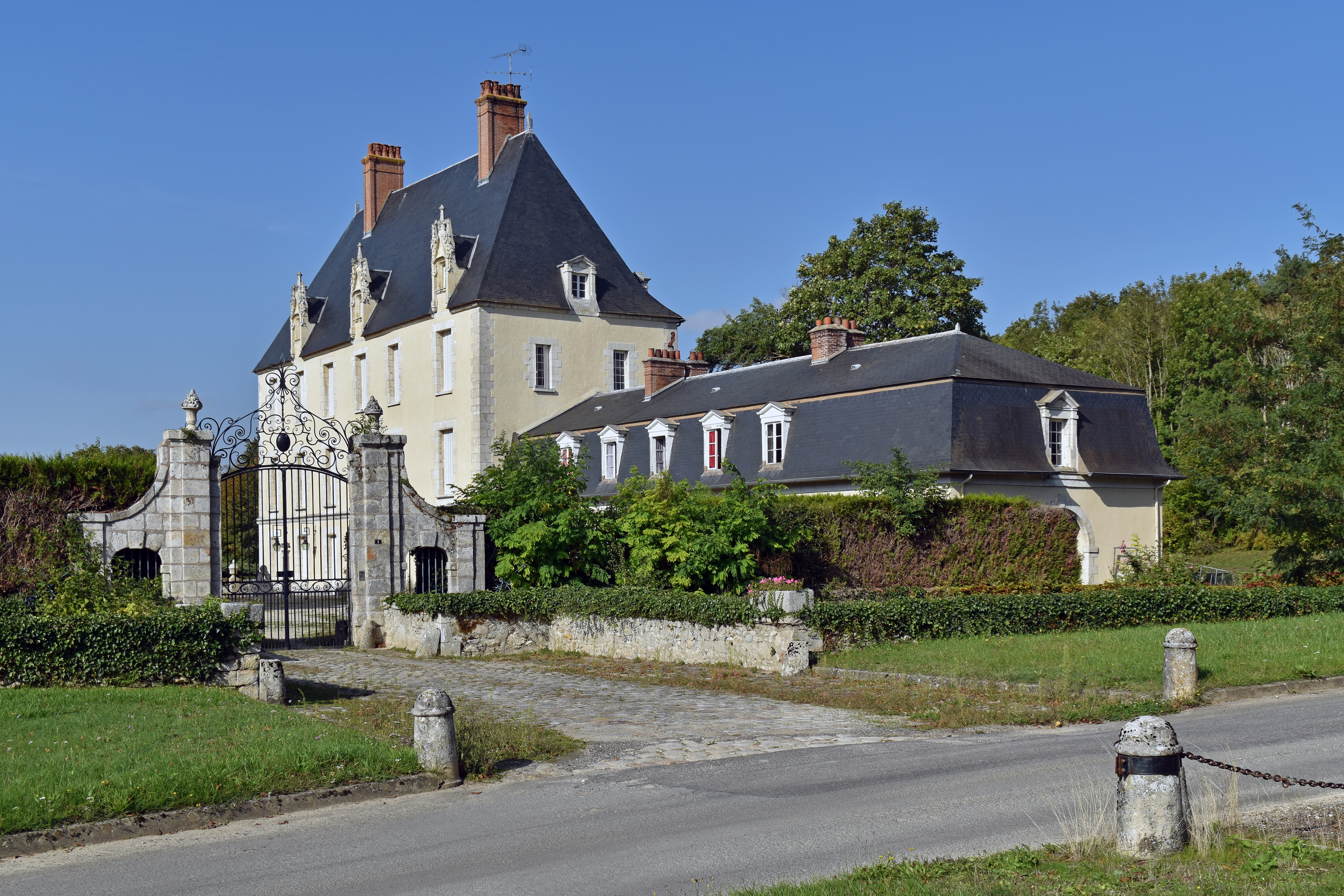 Château de Faÿ-lès-Nemours, Seine et Marne, France .